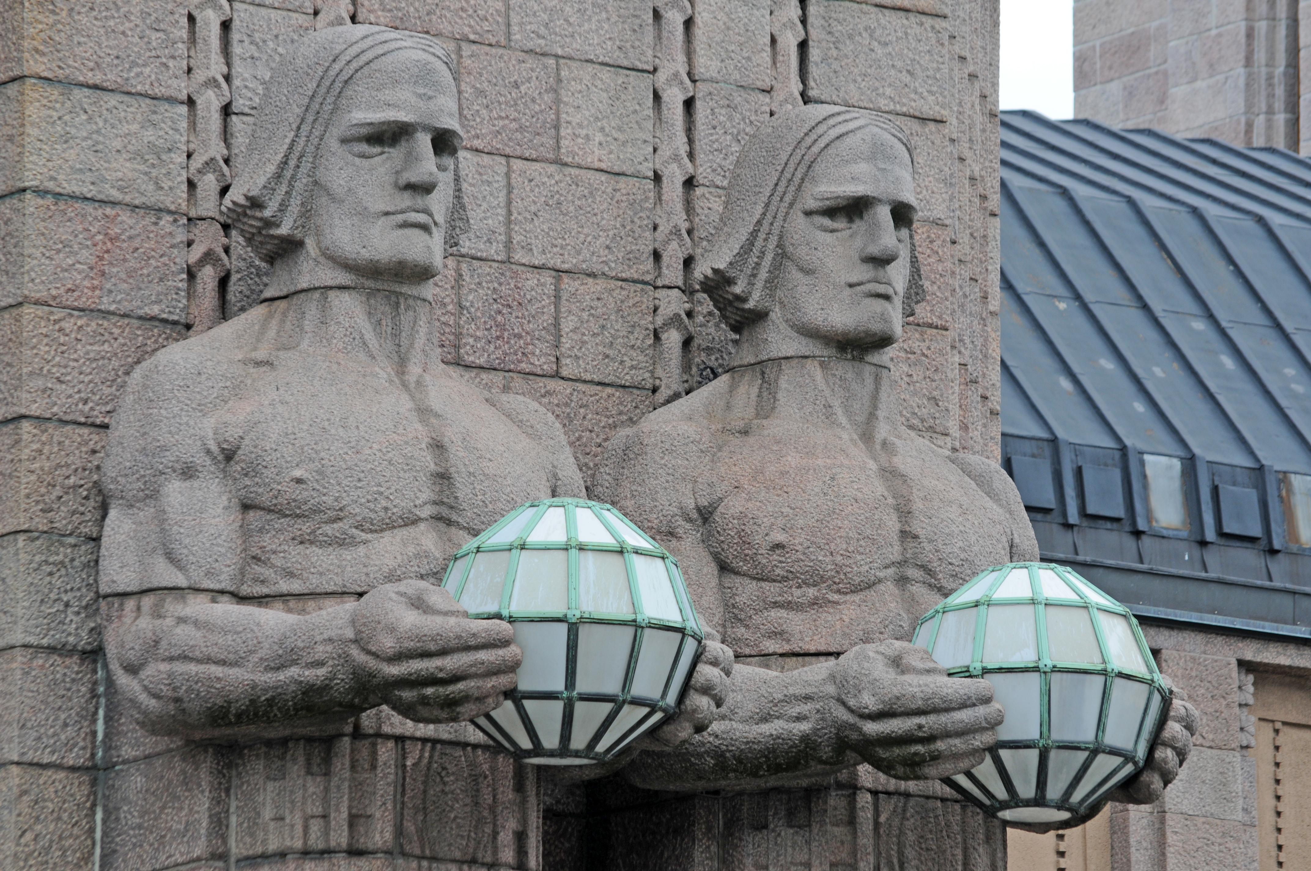 Lyhdynkantajat (1914) - Emil Wikström. Sijainti: Rautatieaseman pääovi